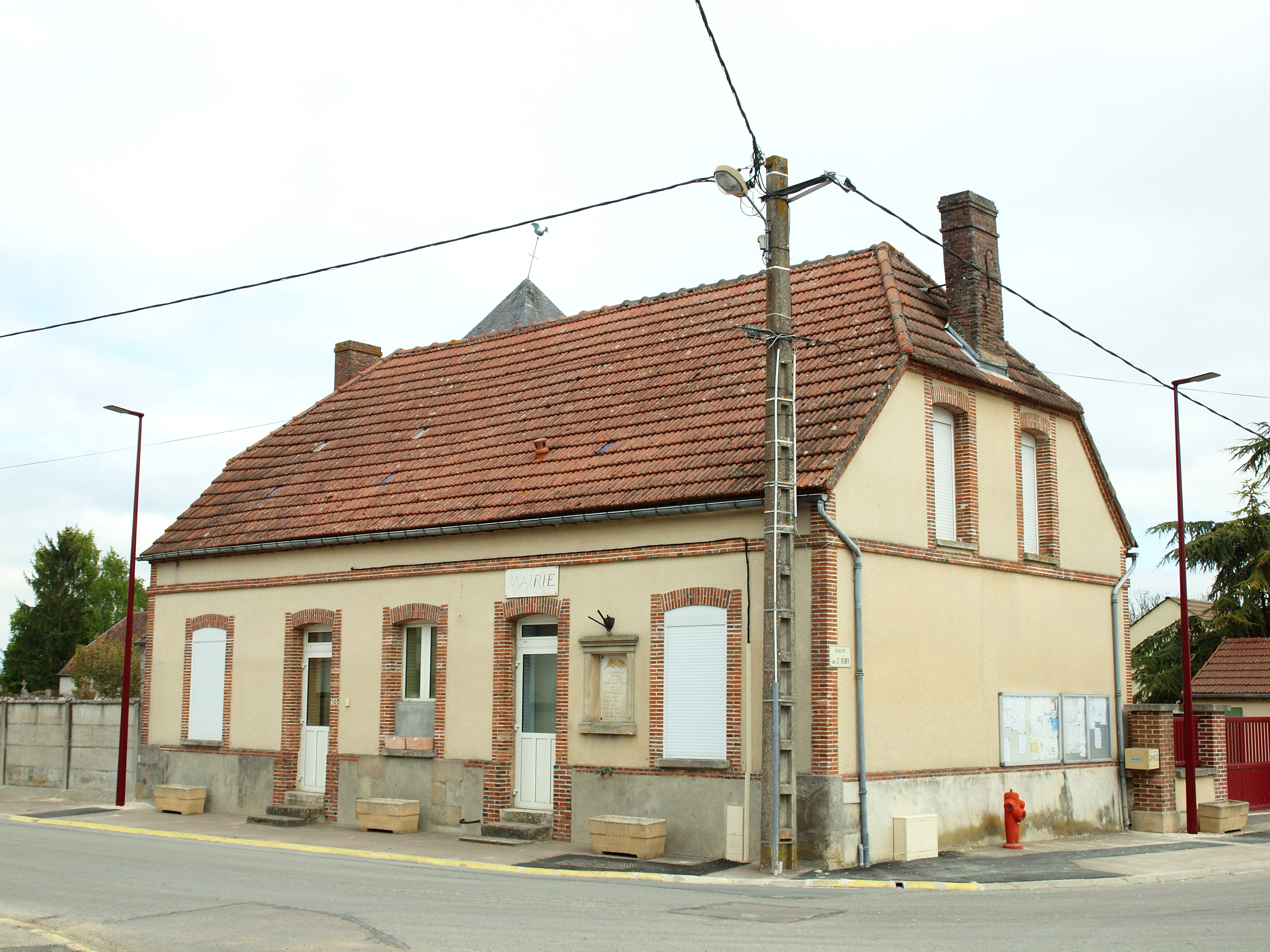 Chichey (Marne, France)